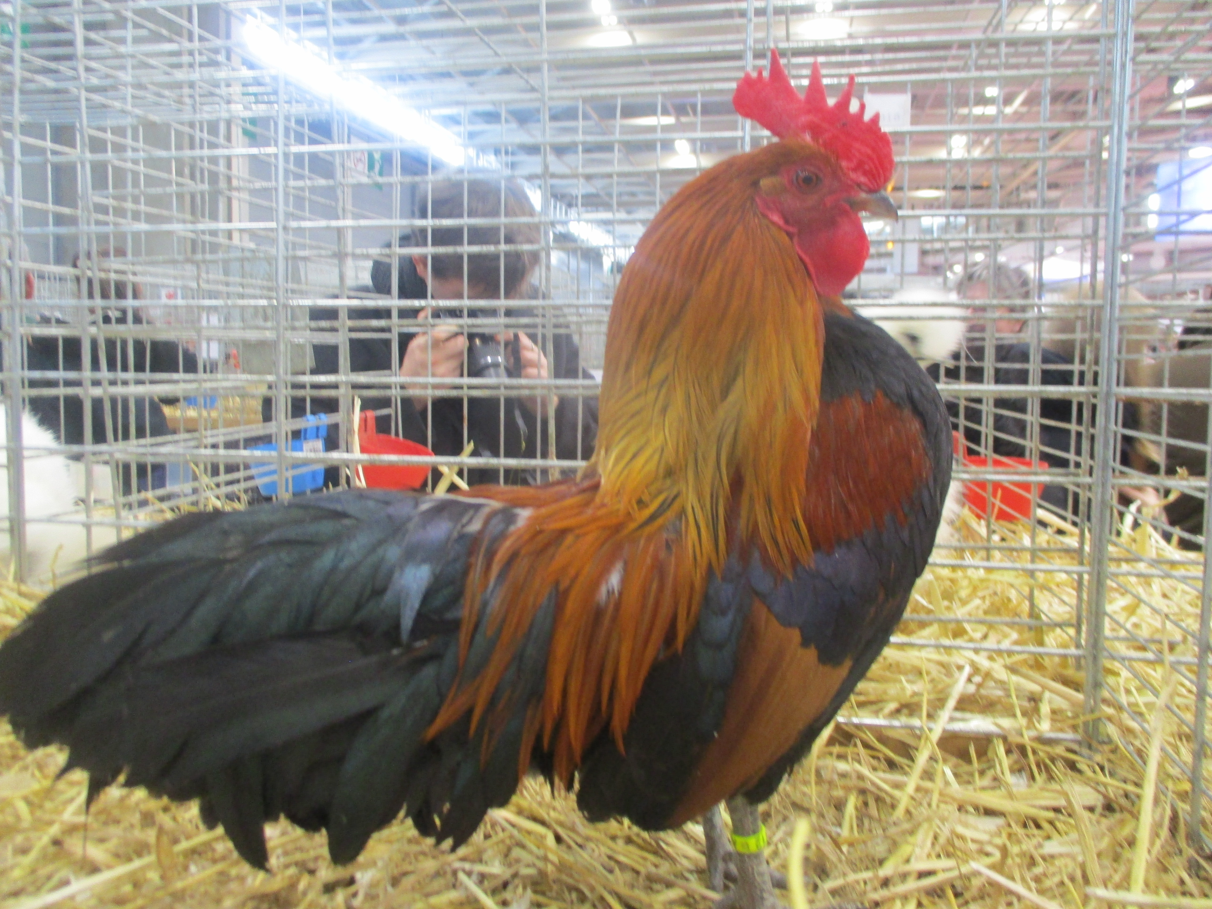 Coq de la race ardennaise. Variété naine dorée.